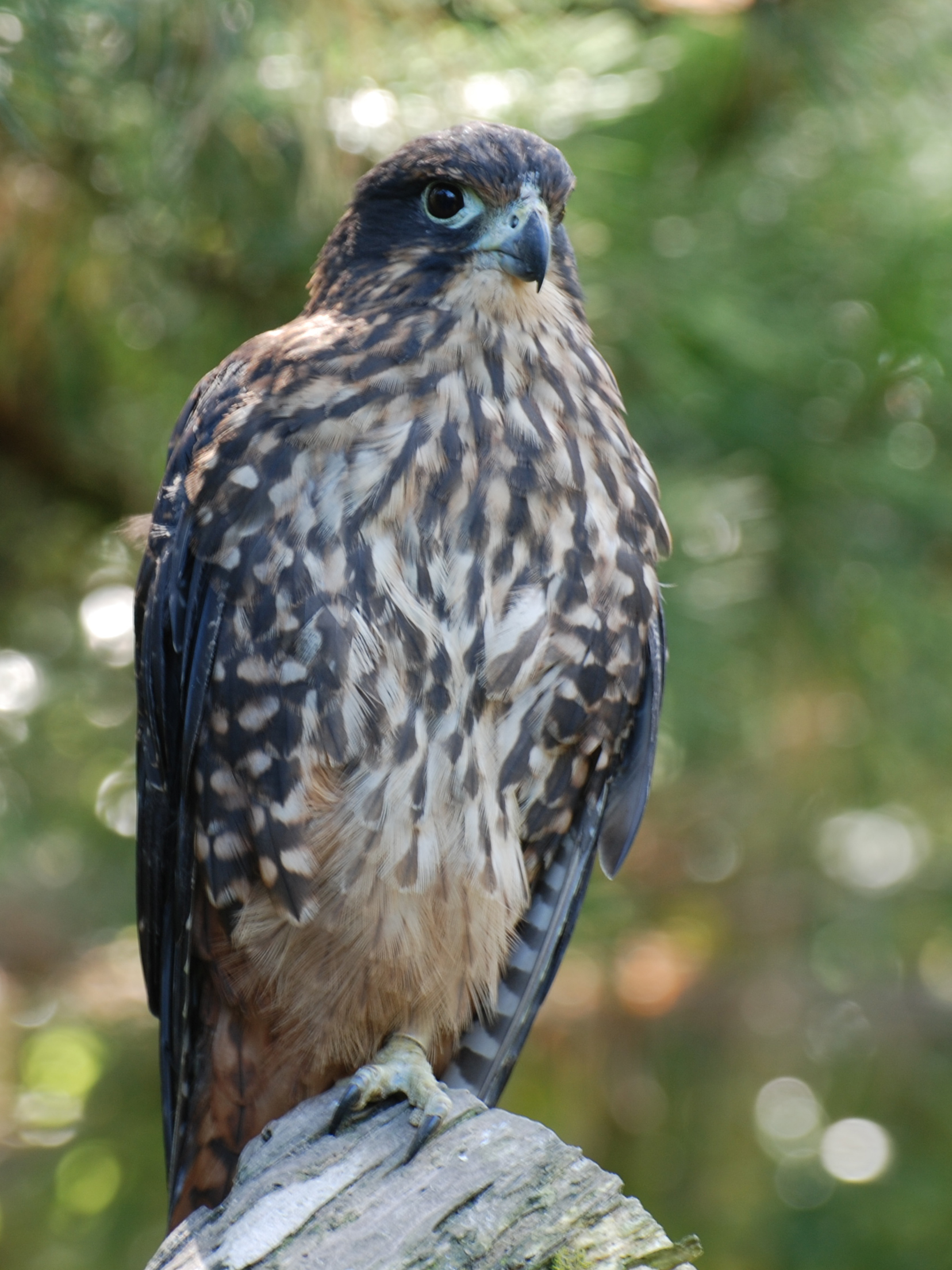 New Zealand Falcon, Falco novaeseelandiae